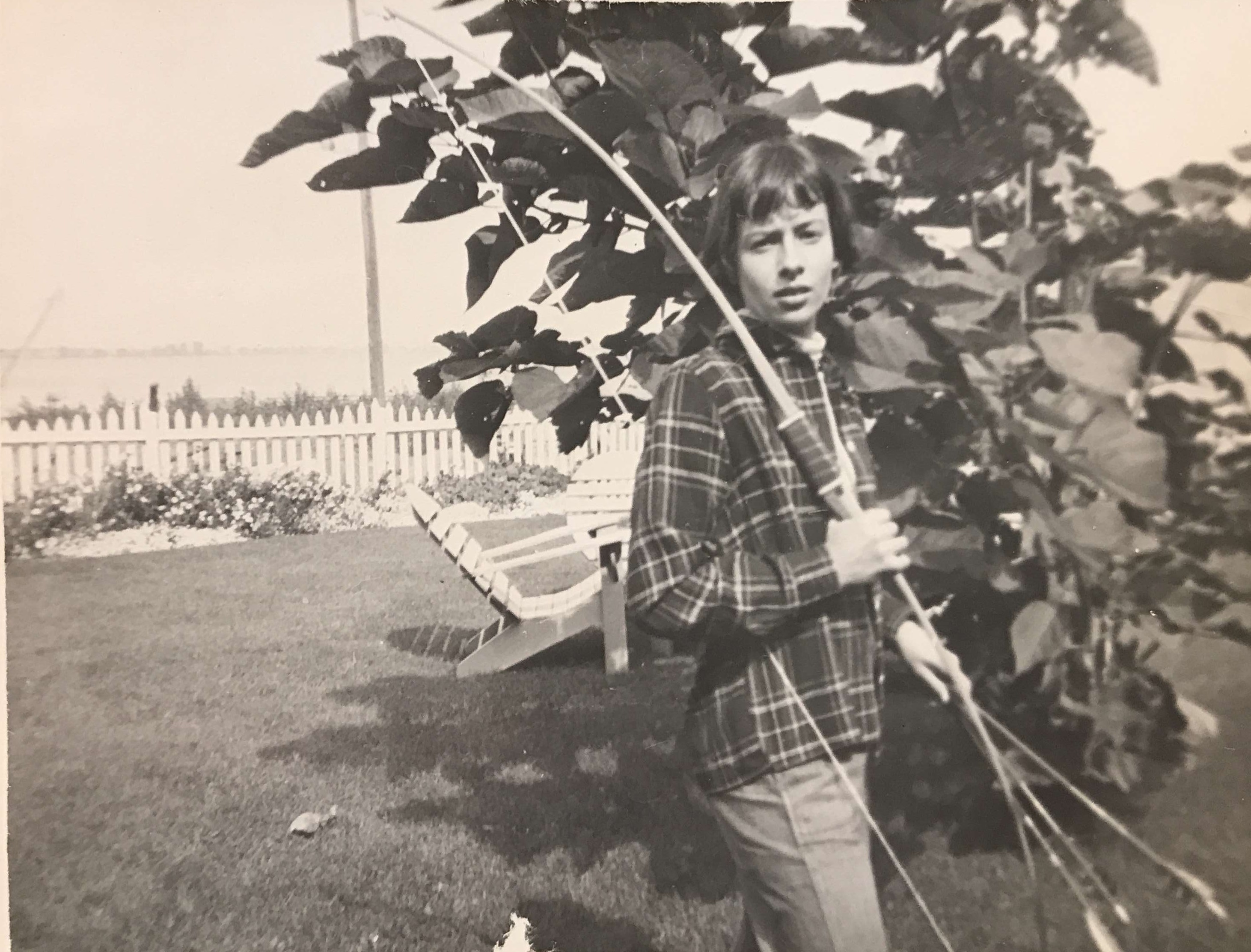 Denise Brosseau